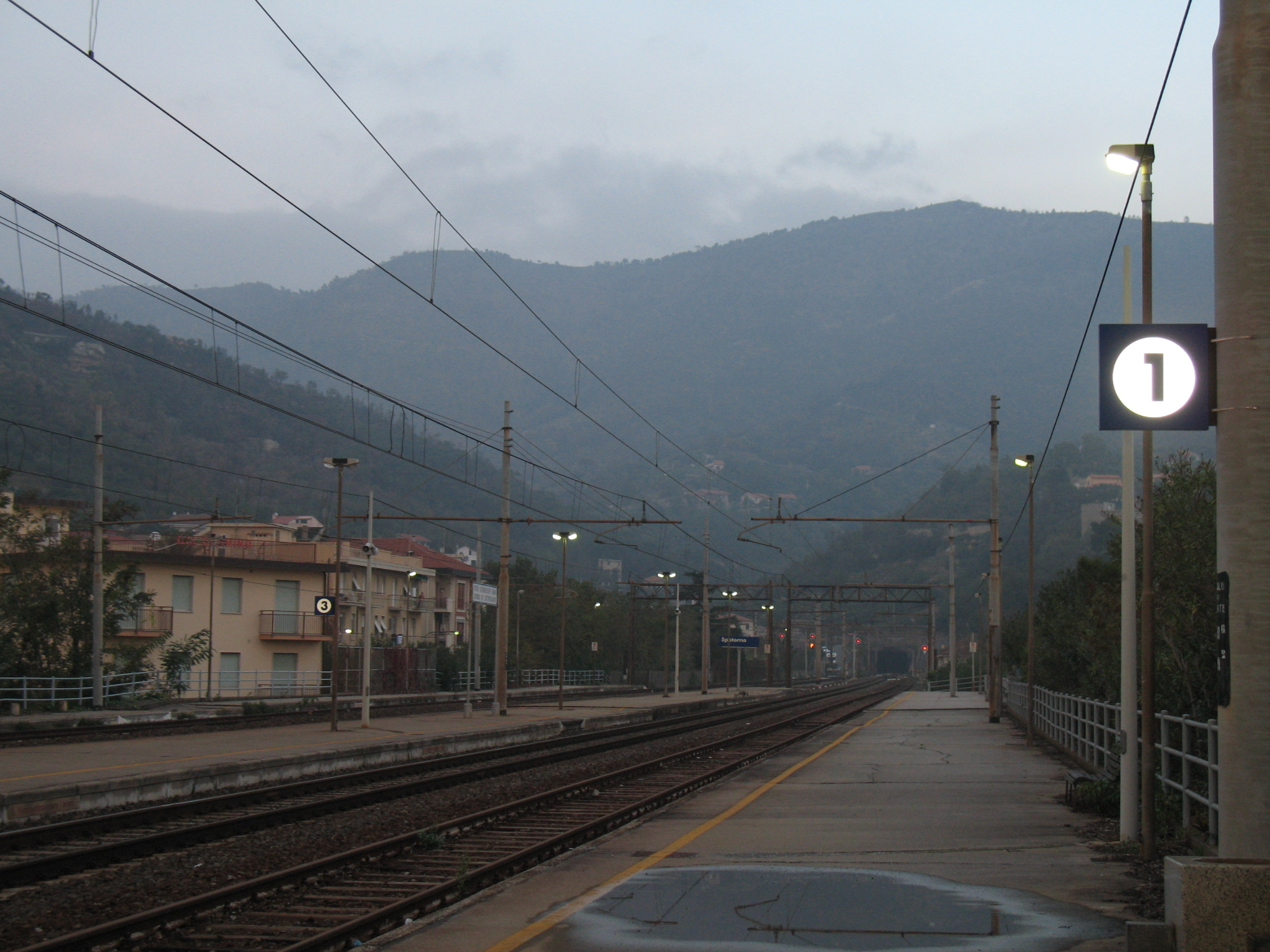 Serie di Immagini da Spotorno in provincia di Savona